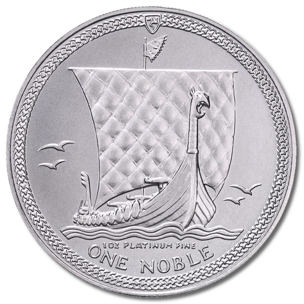 Bildseite der 1 oz Noble Platinmünze.